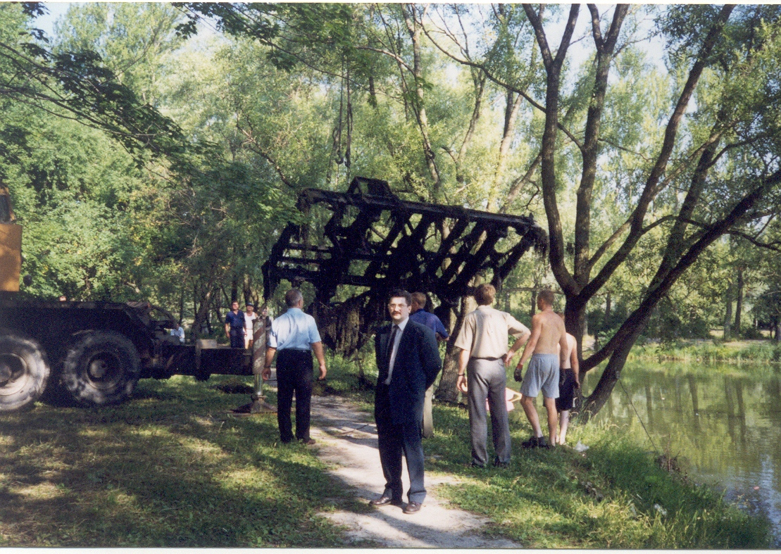 Подъём вагонетки со дна пруда, на переднем плане президент корпорации "Ковчег" и Фонда Жорно - Юрий Юрьевич Жорно, спонсор проекта